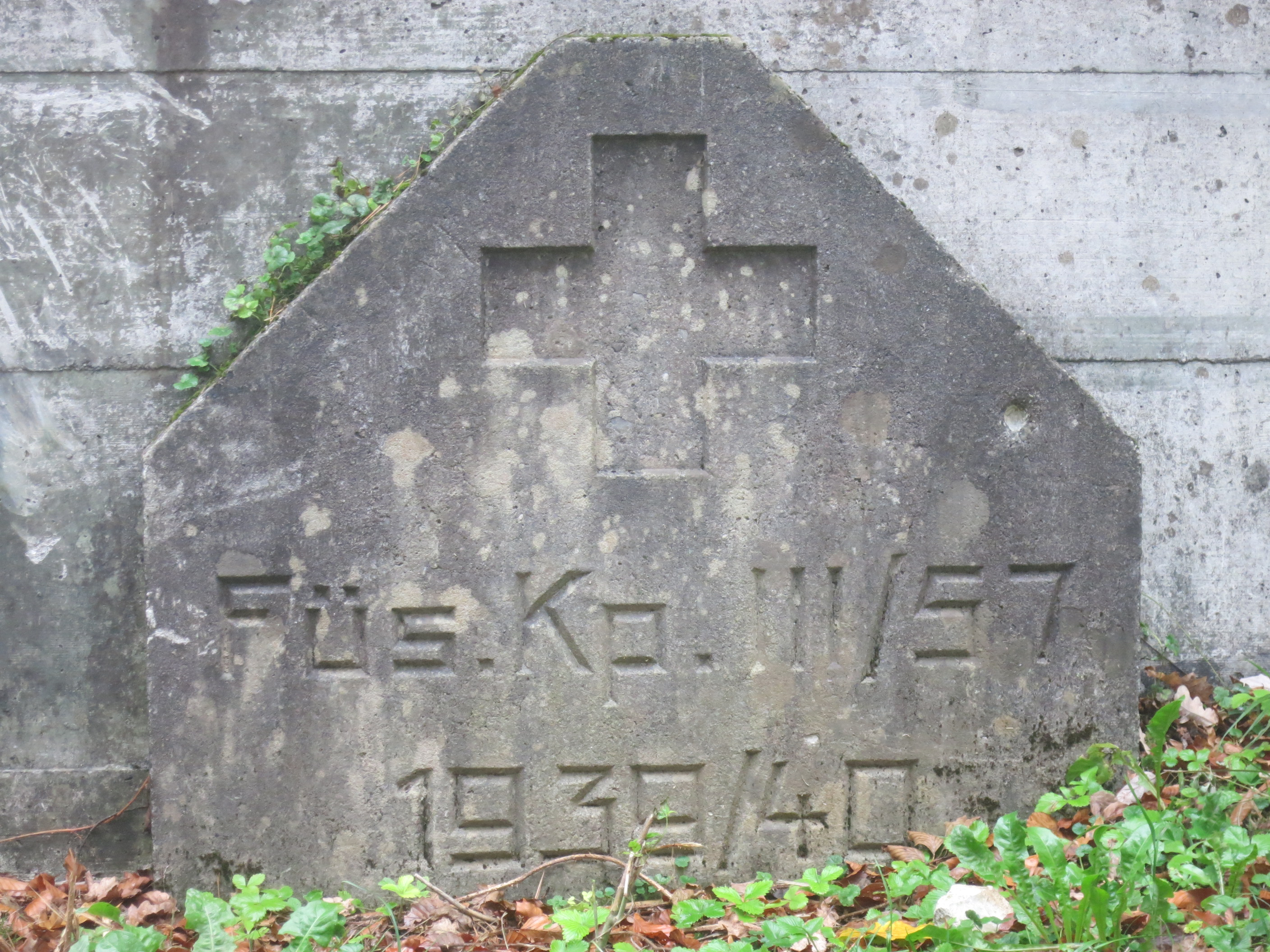 Sperrstelle Bürersteig AG, Schweiz